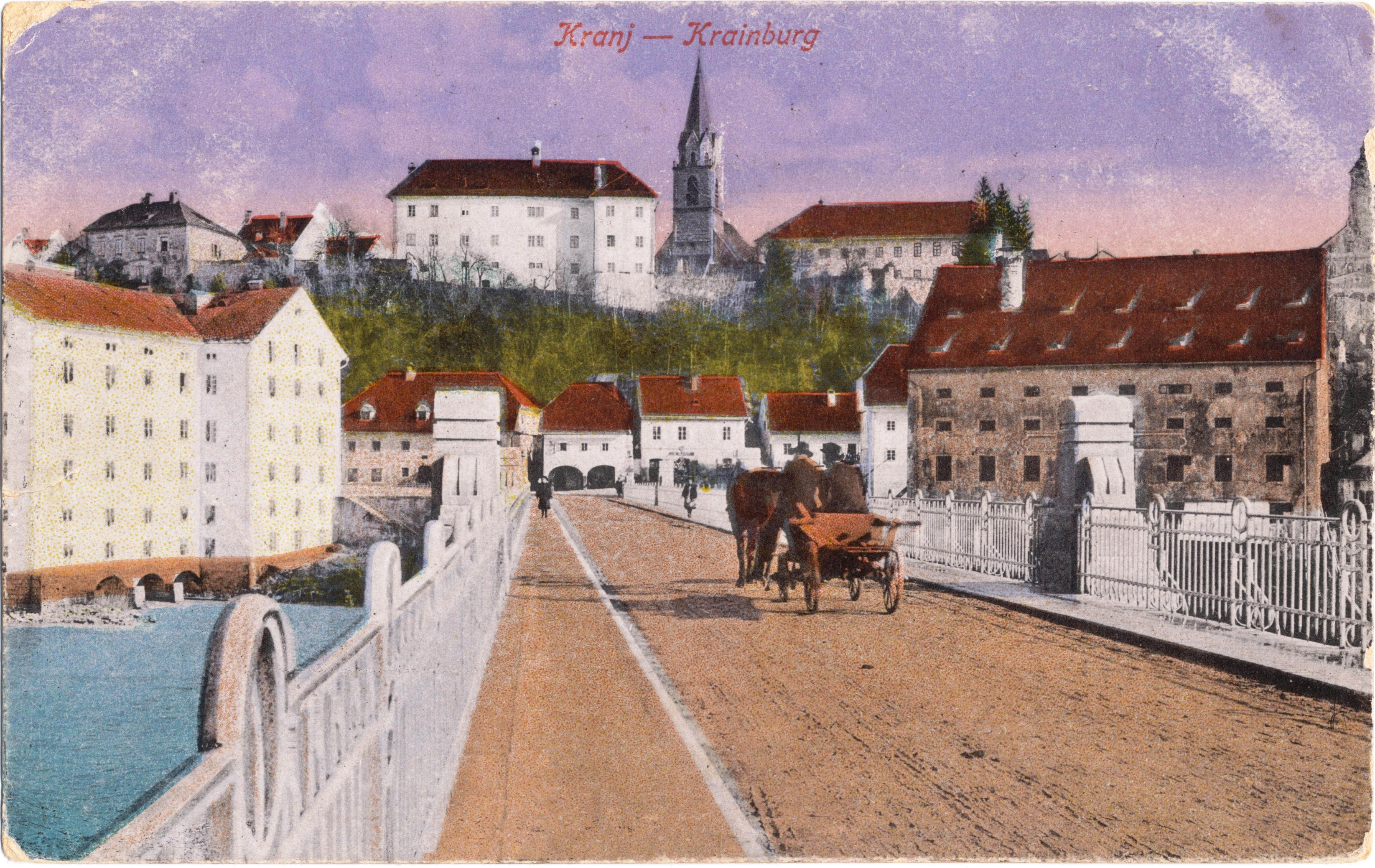 Razglednica Kranja.